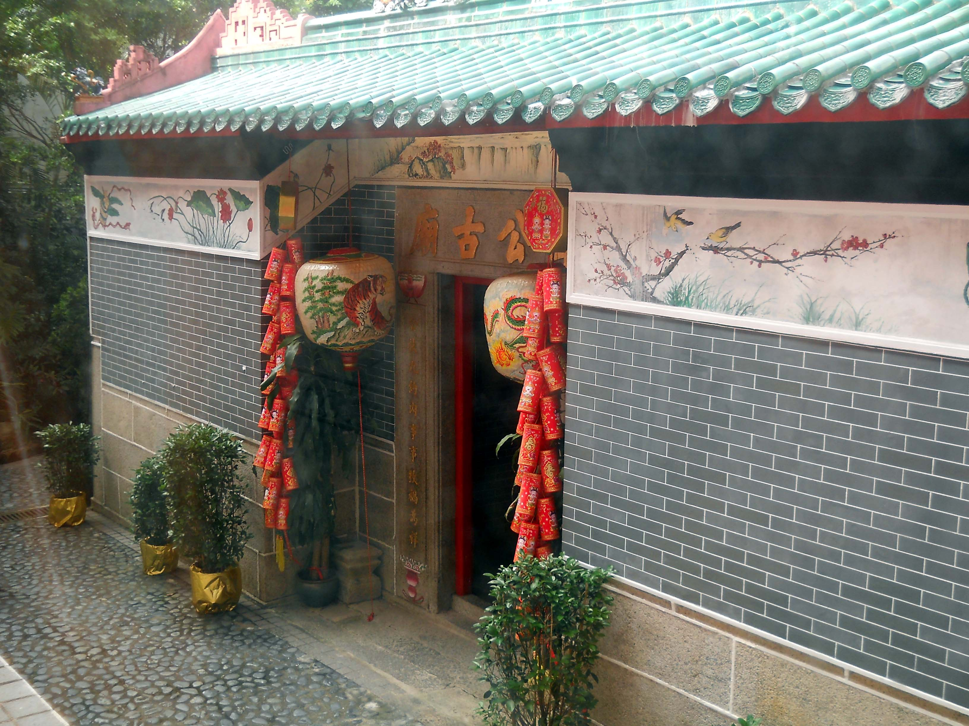 中文（香港）: 舊沙田車公廟